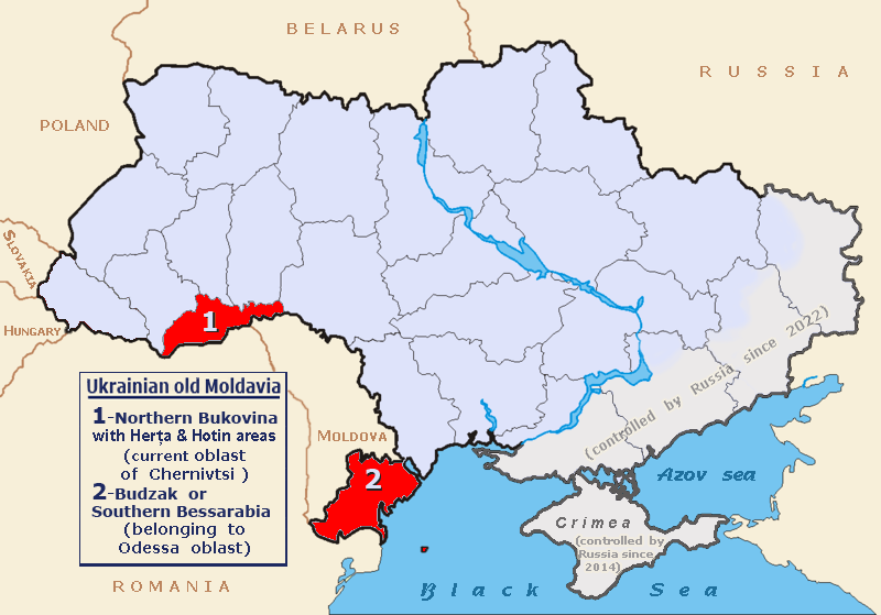 position des régions historiques moldaves en Ukraine